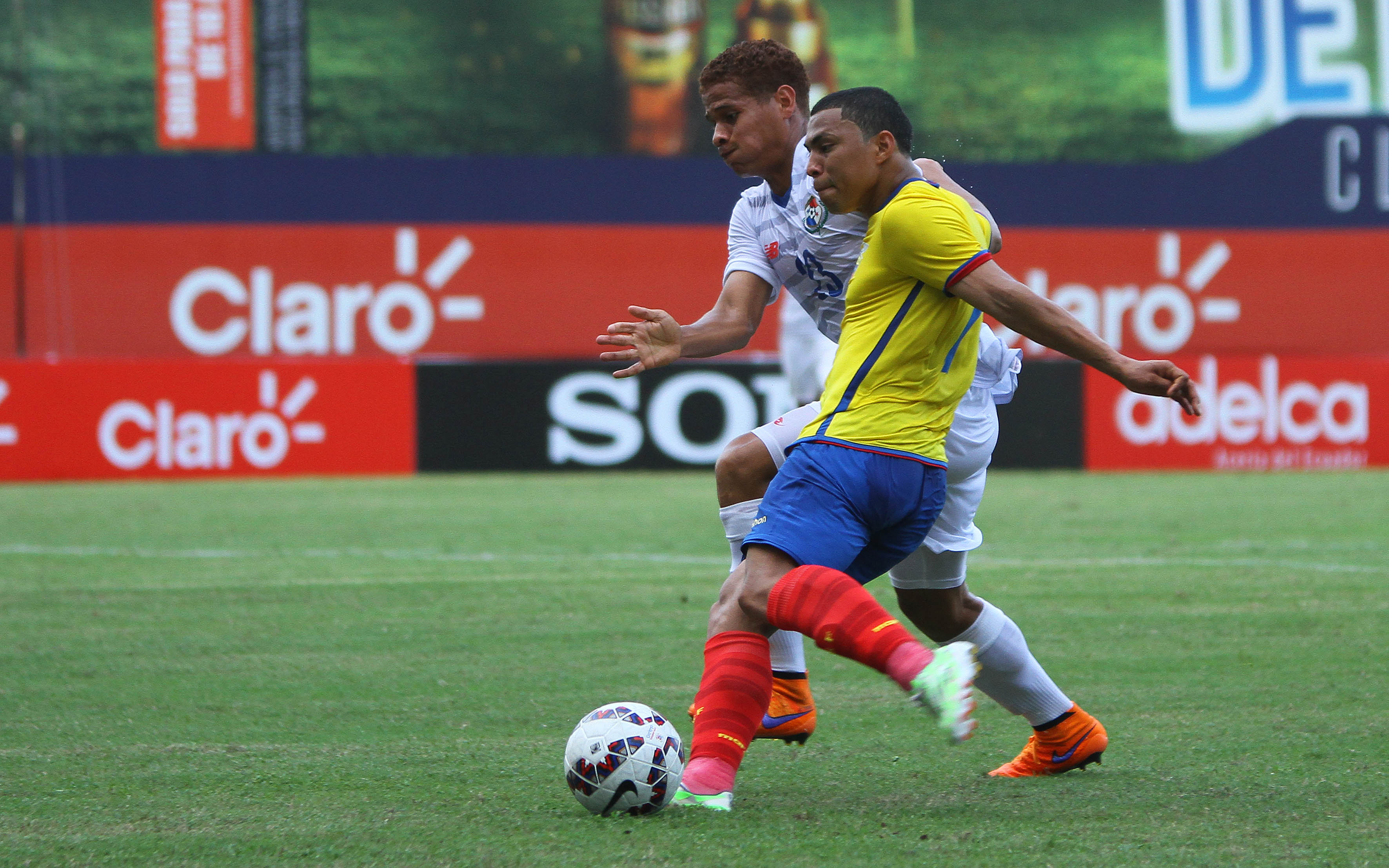 Guayaquil, 06 de jun (Andes).-En el estadio George Capwell, la selección de fútbol de Ecuador se enfrenta a Panamá en partido amistoso Foto: César Muñoz/Andes